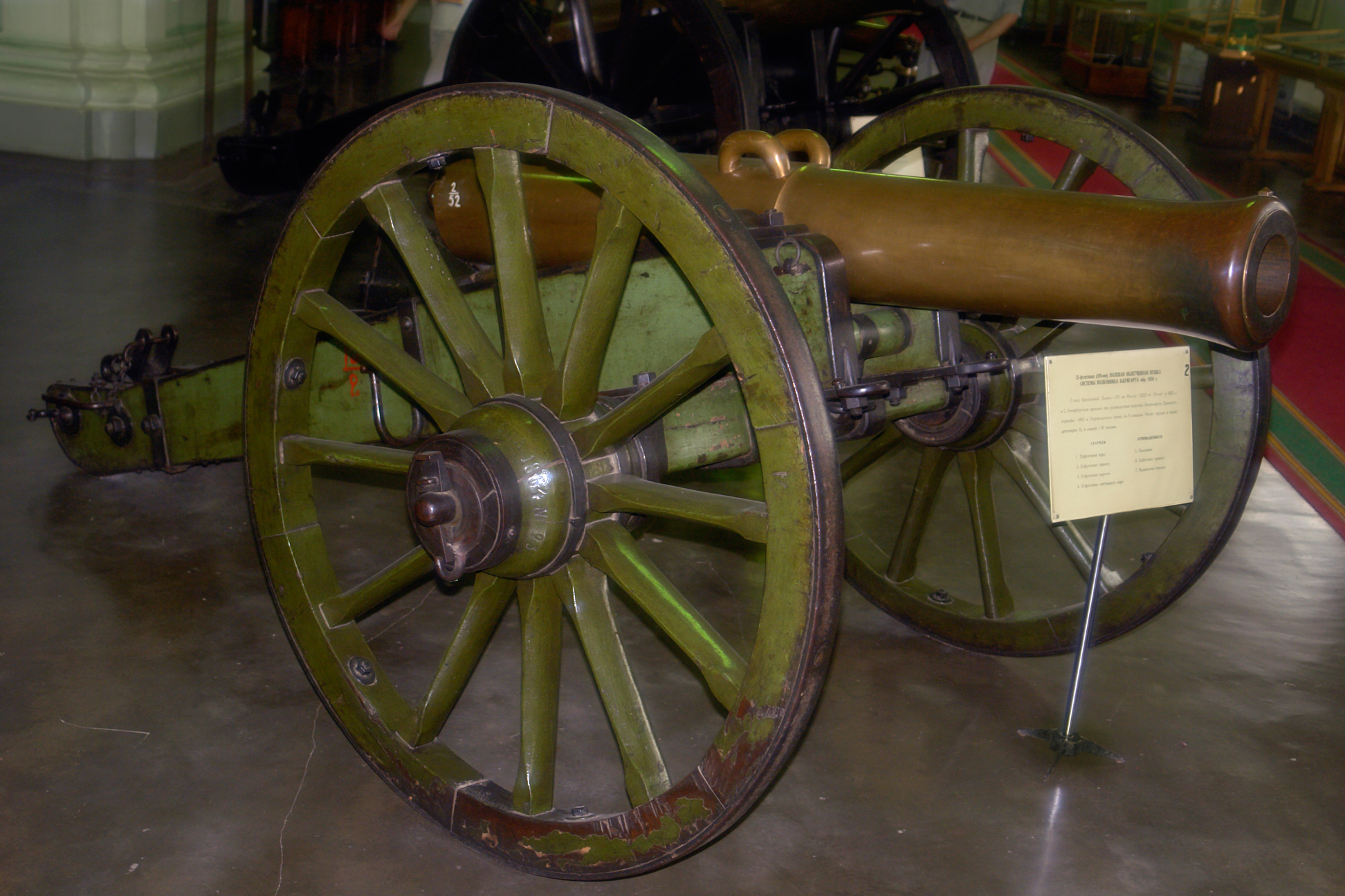 12-фунтовая (120-мм) полевая облегченная пушка системы полковника Баумгарта образца 1850 г. Бронзовый ствол, 175см, вес 522.8кг, отлит в 1855 под руководством порутчика Энгельгардта в Санкт-Петербургском арсенале. Дальность 1065 м. Военно-исторический музей артиллерии, инженерных войск и войск связи, Санкт-Петербург.